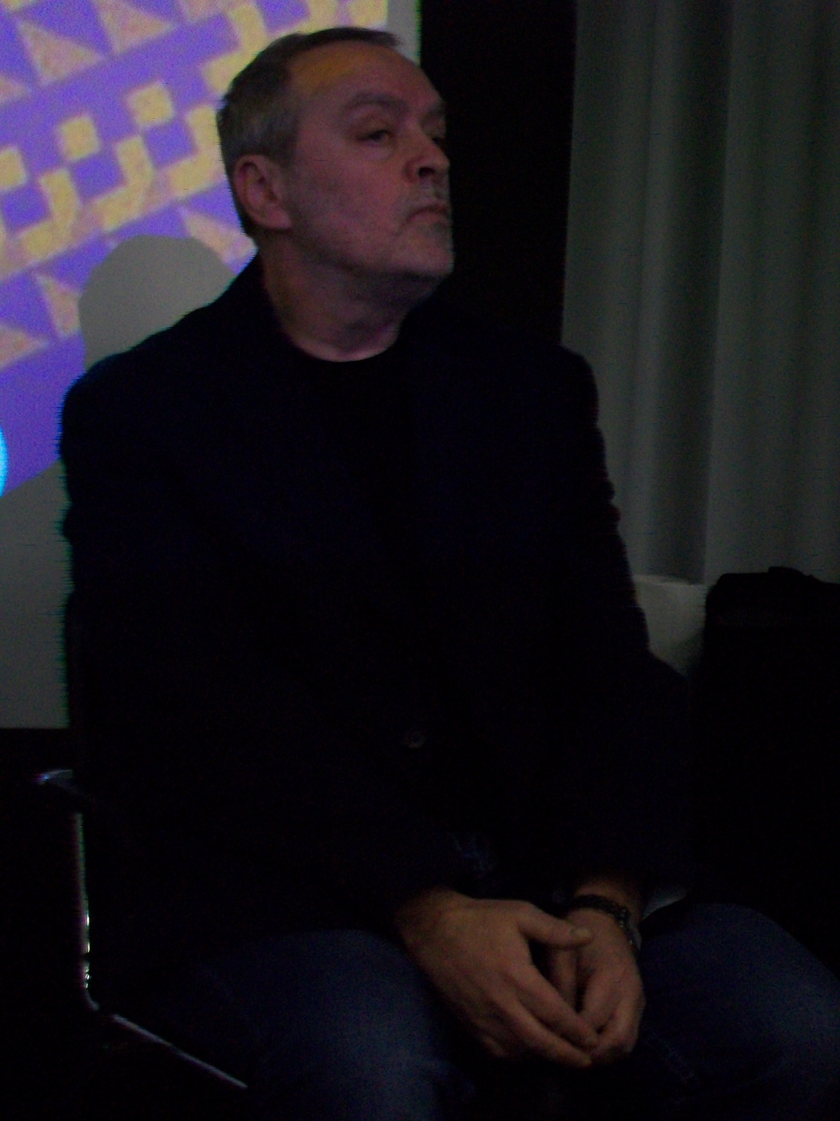 Сахновский Игорь Фэдович в Ельцин-центре. Екатеринбург, 15 сентября 2017 года